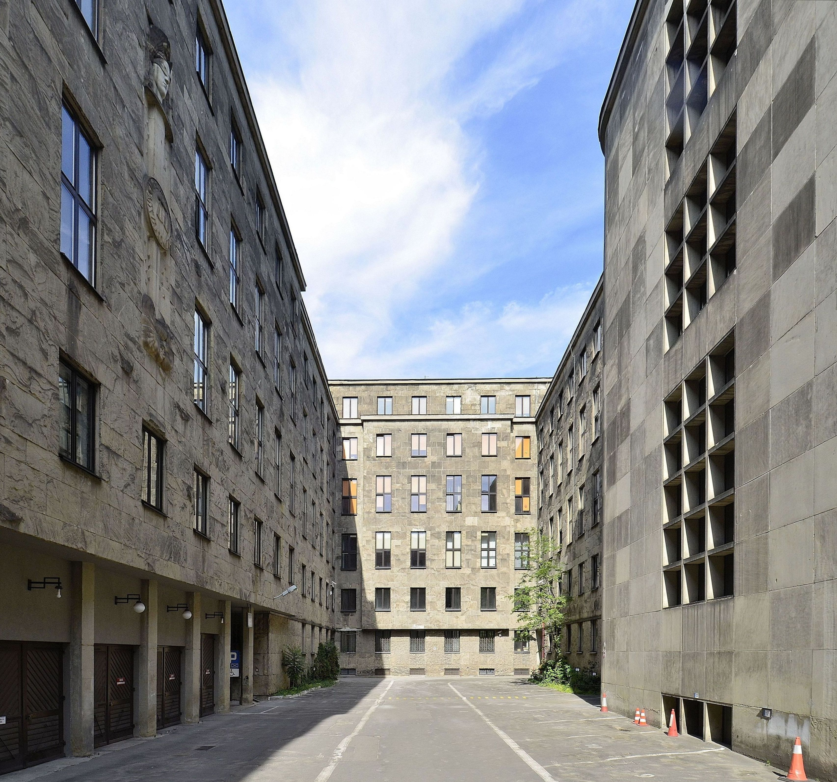 Dziedziniec gmachu Sądu Okręgowego w Warszawie (tzw. Sądy na Lesznie)